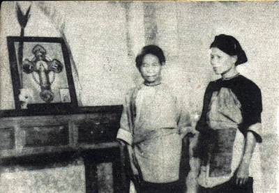 臺灣屏東萬丹部落平埔族家庭信仰天主教供奉聖母像